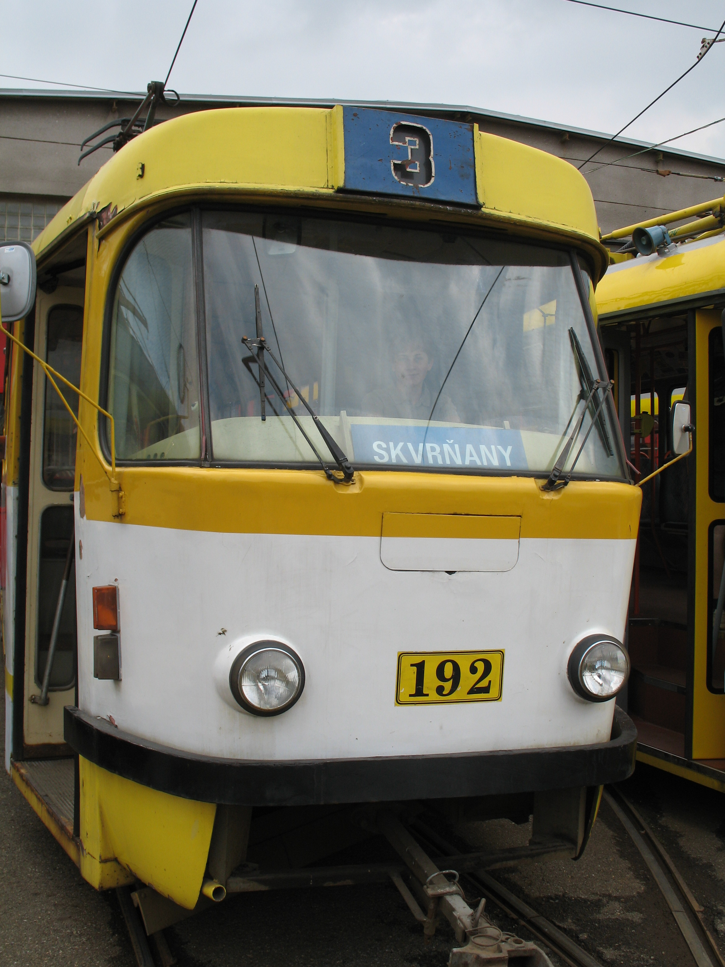 Přední čelo plzeňské tramvaje Tatra T3.